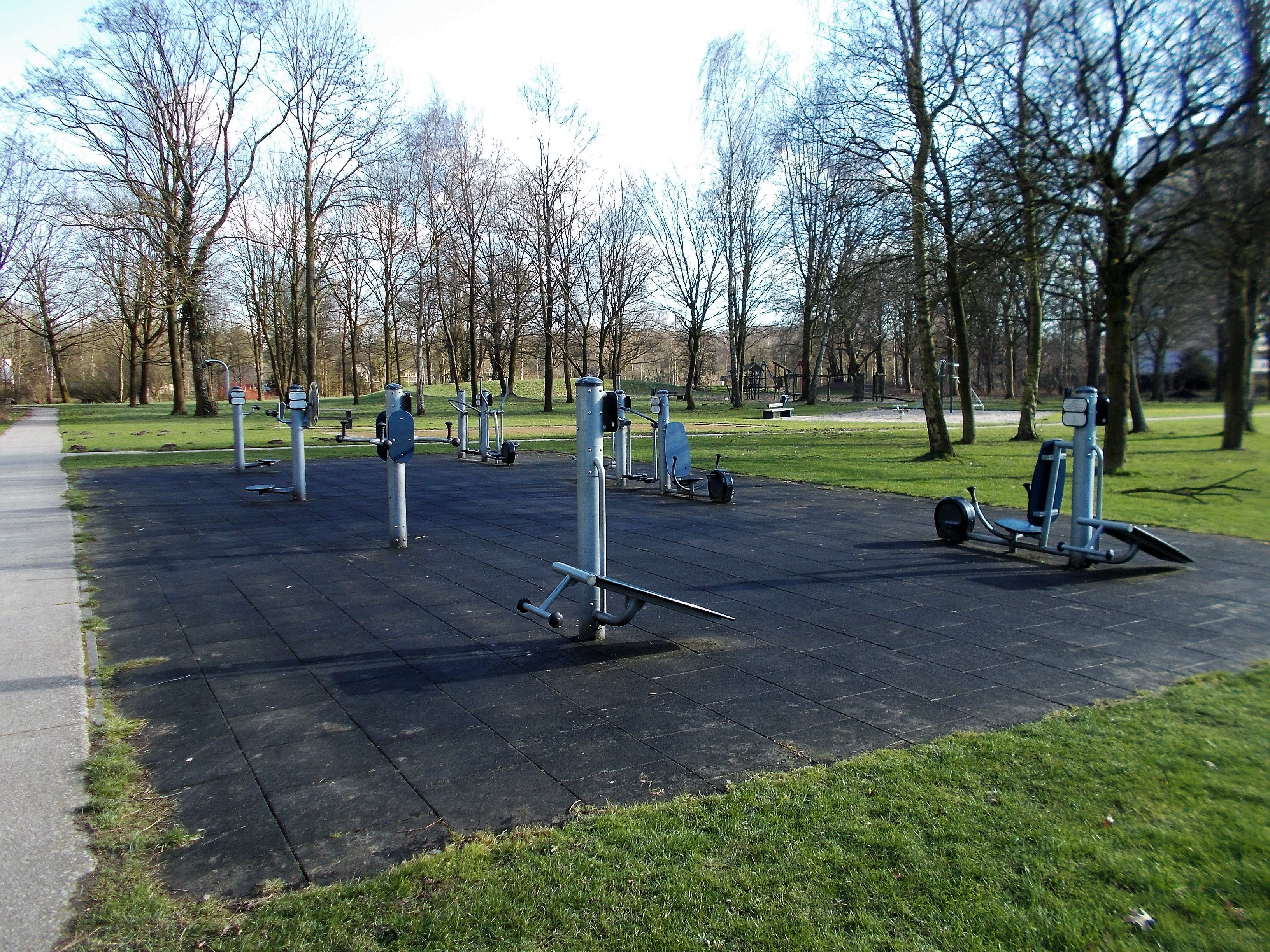 Parkje voor actieve bezigheden tussen hoogbouwflats te Deventer. Het bestaat uit een parcours met fitnessapparaten, petanquebanen, een trapveldje, een klimheuvel en meerdere speelplaatsen voor kinderen van verschillende leeftijd.